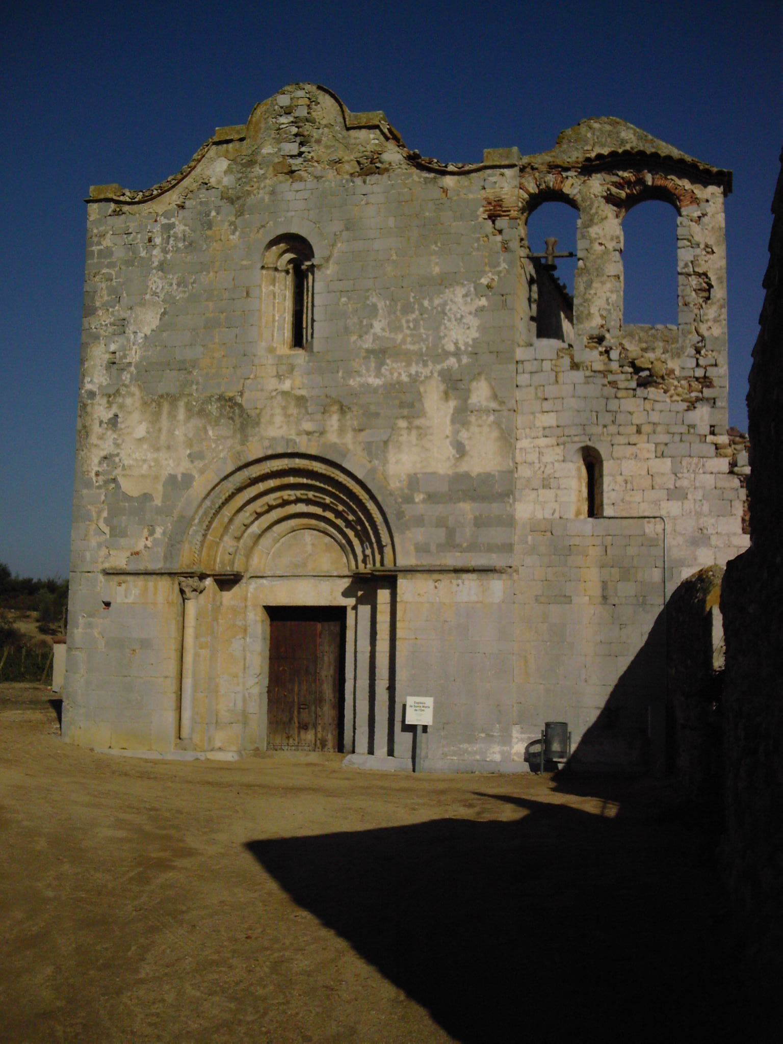 église sta Maria de L'Om